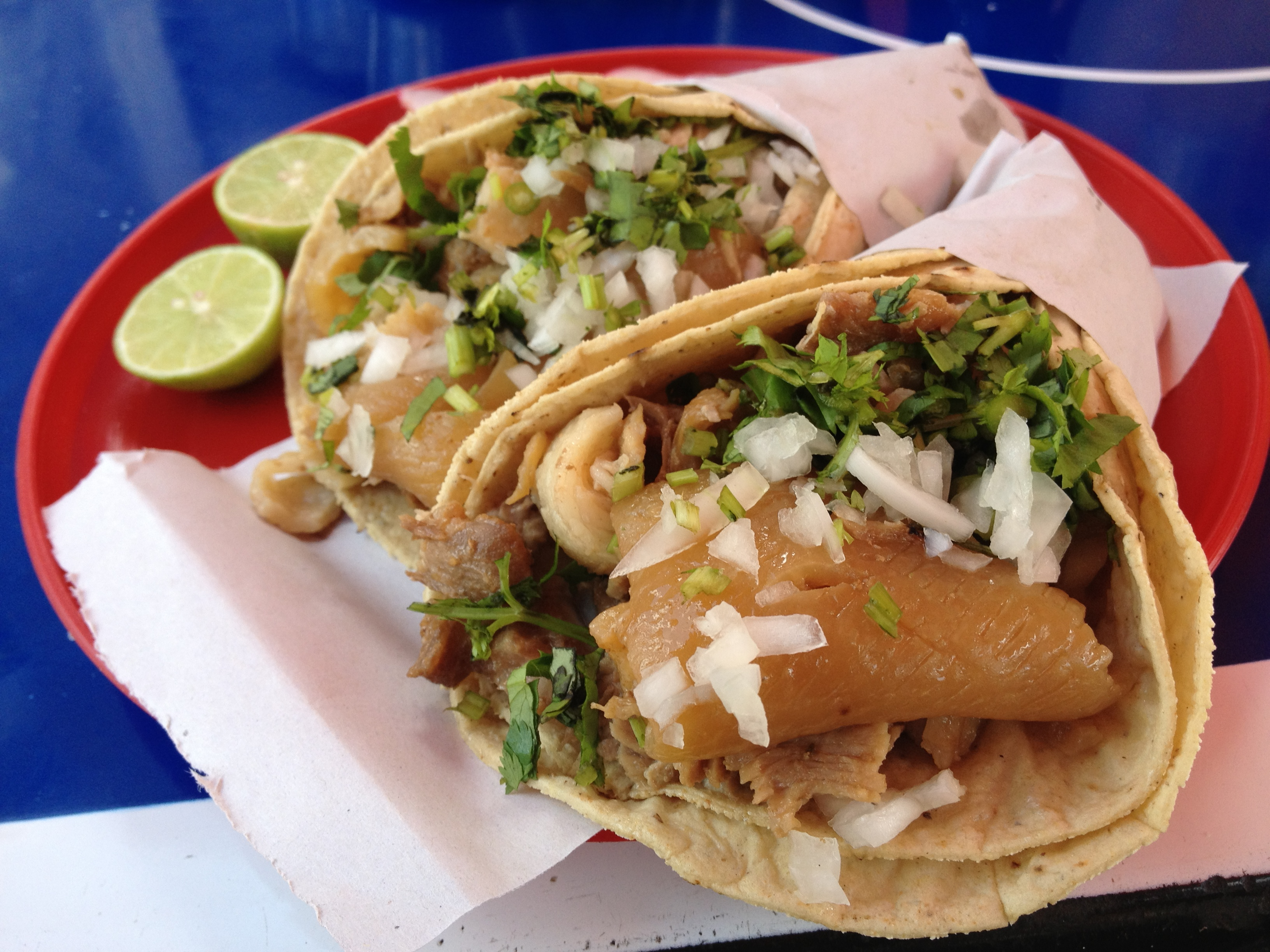 Taco de carnitas, comida popular en el centro de México.